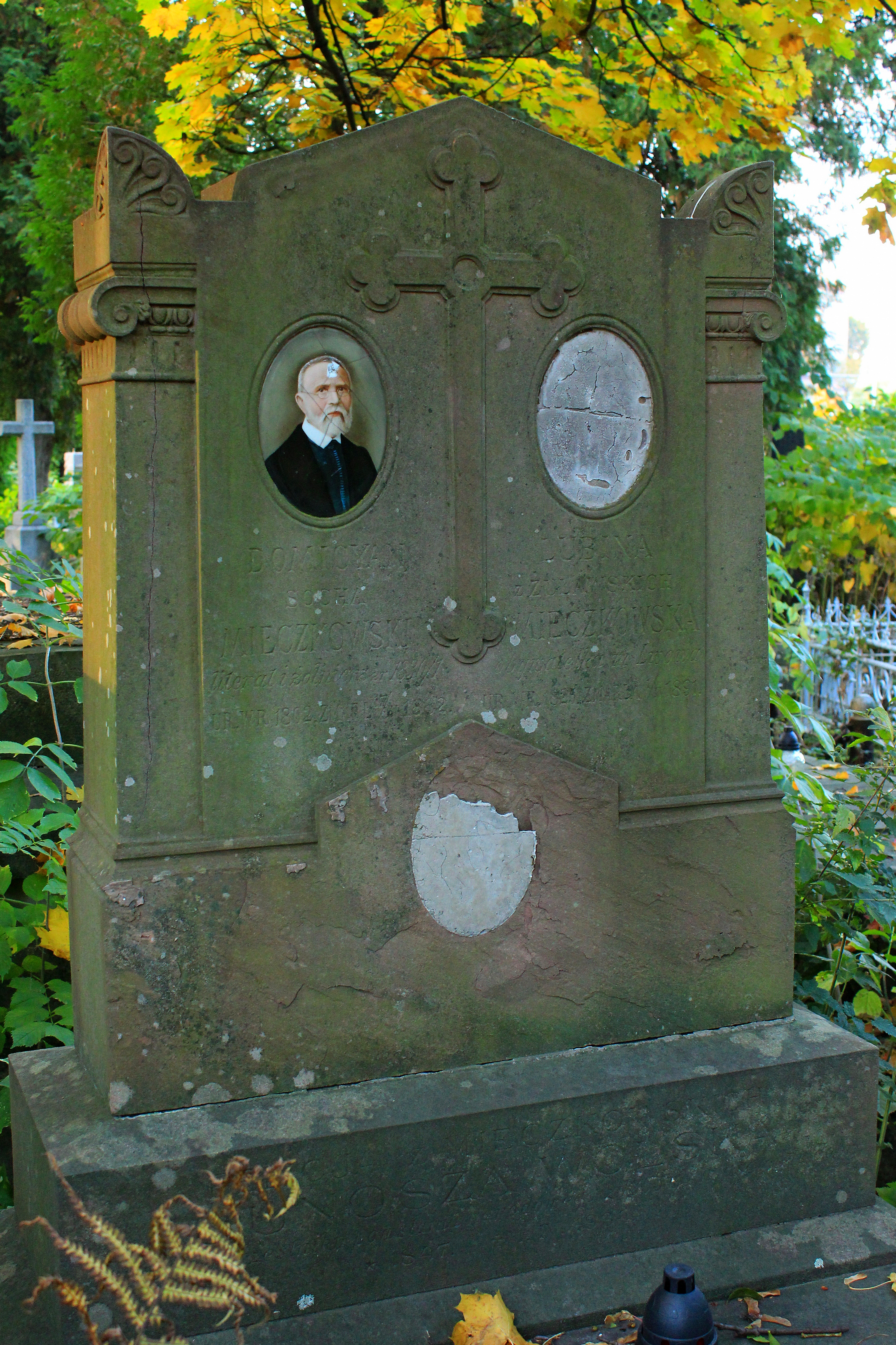 Гробівець родини Мешковських. Личаківський цвинтар , поле 1а.